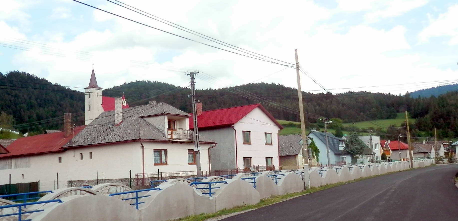 Obec Vyšný Slavkov, okres Levoča.